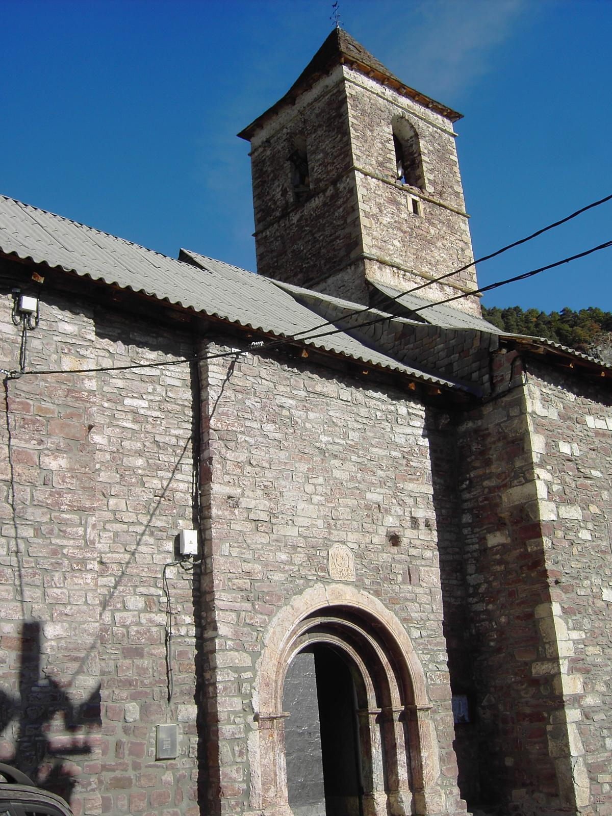 La iglesia de Chistén.